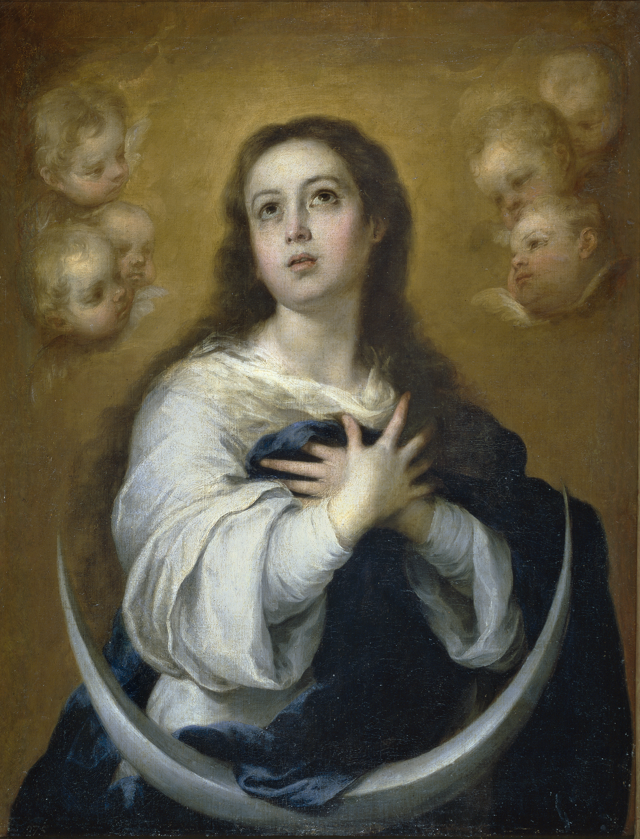 Esta obra es una de las varias Inmaculadas pintadas por Bartolomé Esteban Murillo que se conservan en el Museo del Prado, situado en la ciudad de Madrid, (España). La Virgen María, madre de Jesucristo, aparece de medio cuerpo y con una luna creciente de plata a sus pies, mientras que a los lados de la Virgen hay seis serafines. Los colores de la túnica y del manto, junto con el pelo suelto y las manos entrecruzadas sobre su pecho ponen de manifiesto que se trata de una representación de la madre del Salvador, y la luna creciente confirma que se trata de la Inmaculada Concepción.